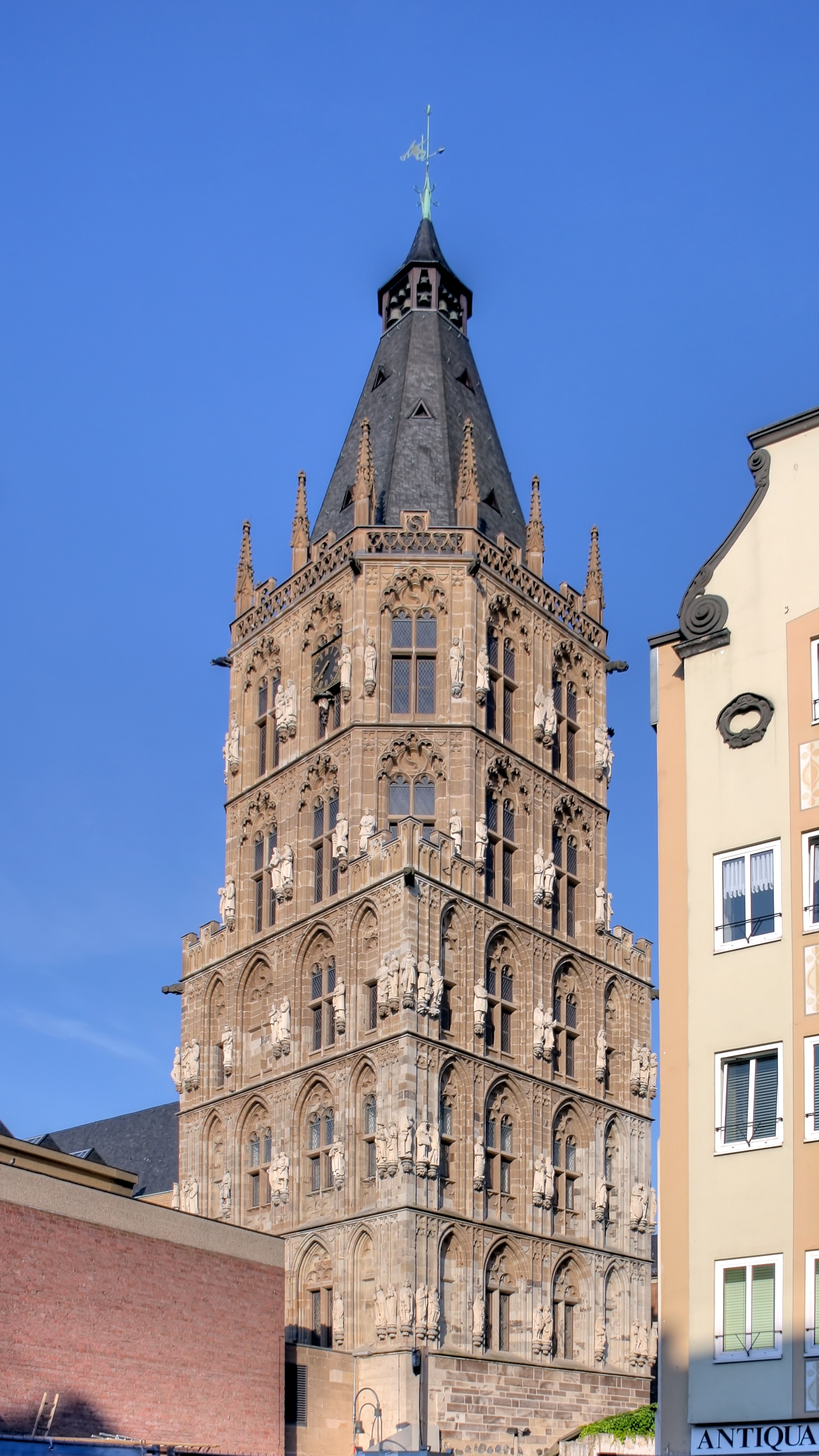 Rathausturm Köln. Ansicht von Nordost.